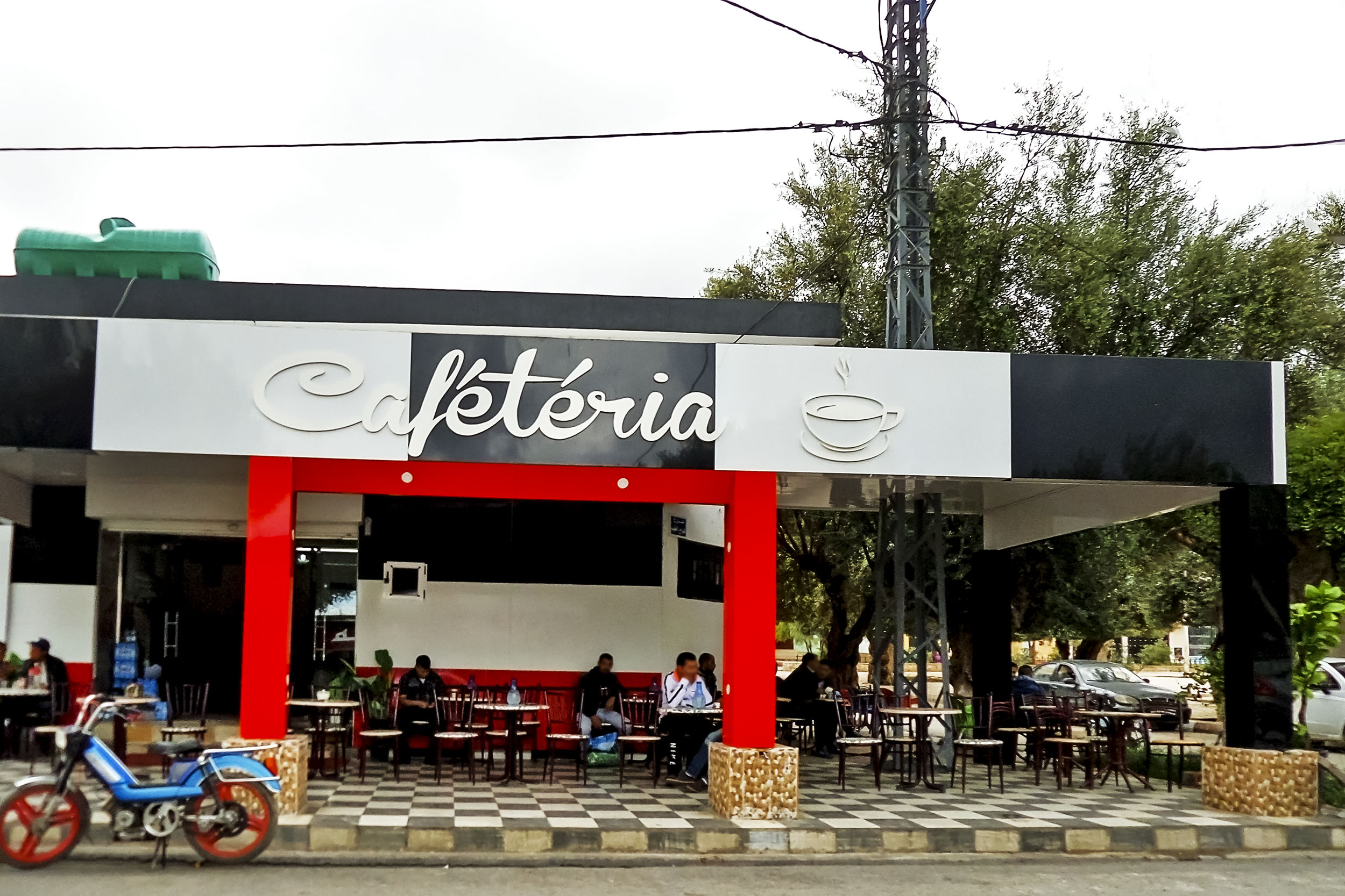 Cafétéria - Sidi Boubkeur مقهى - سيدي بوبكر